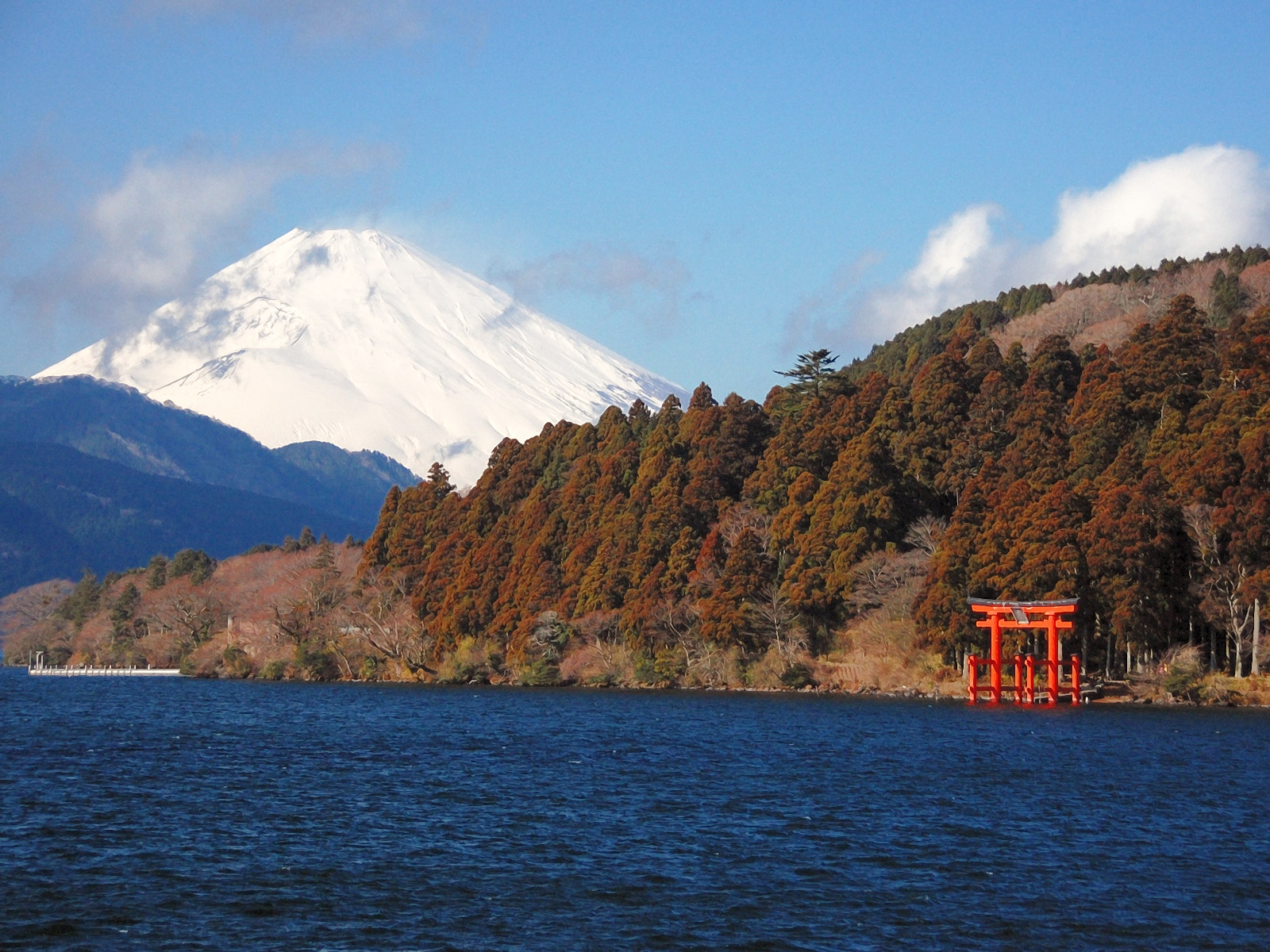 芦ノ湖と富士山。元箱根で撮影。